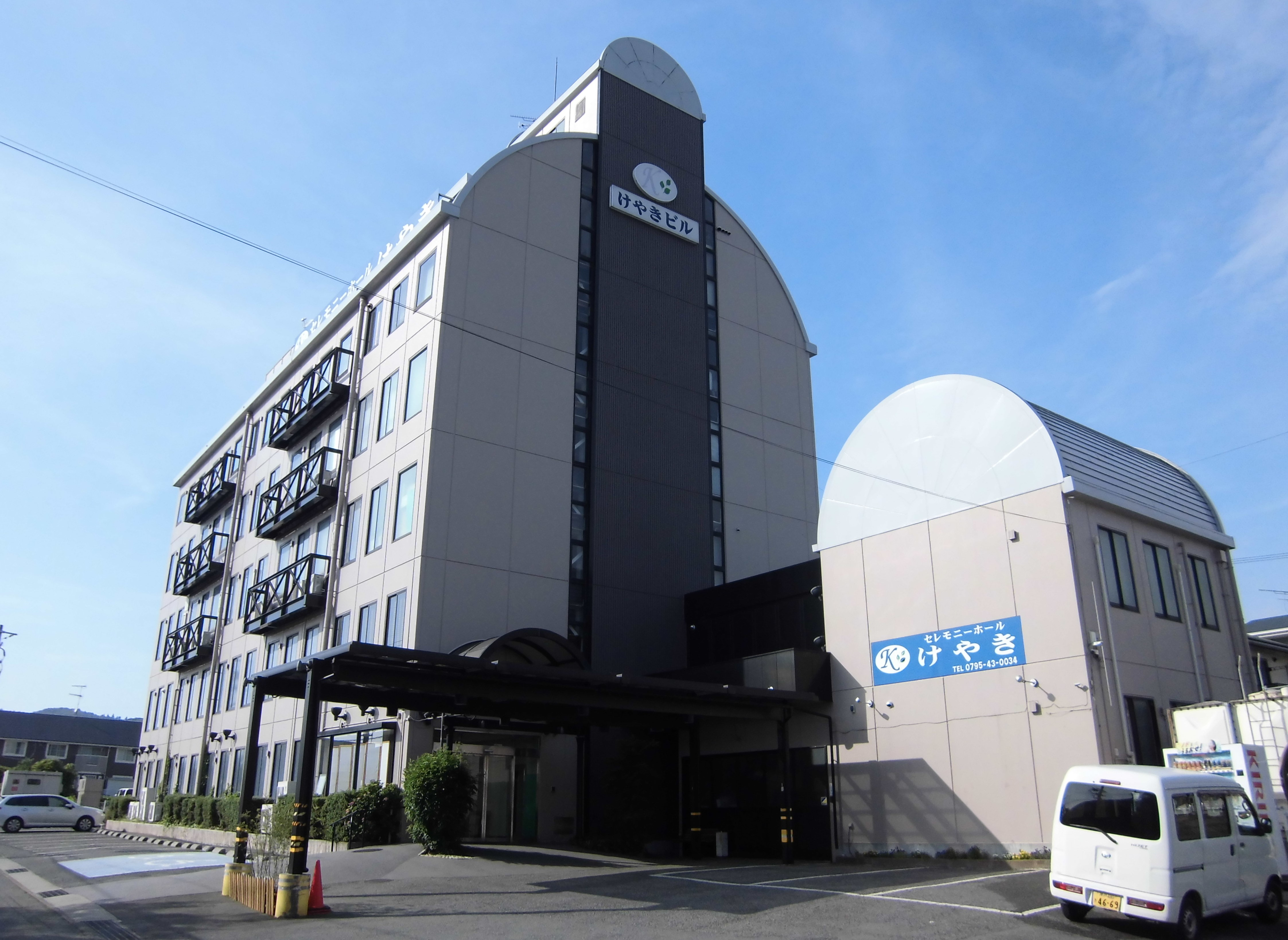 けやきビル 加東市